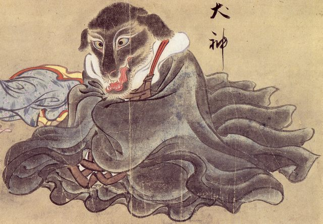 Inugami (犬神, a dog-spirit) from the Hyakkai Zukan (百怪図巻)